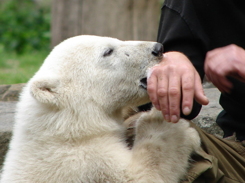 Eisbär Knut am 31. Mai 2007 im Zoologischen Garten Berlin